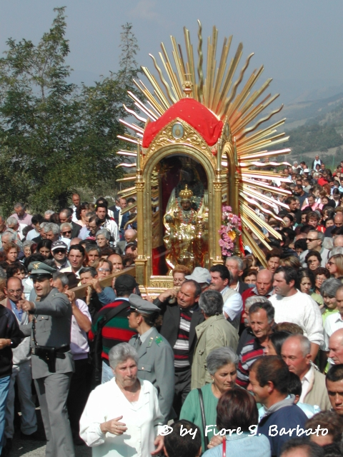 Festa della Madonna di Viggiano (Basilicata)